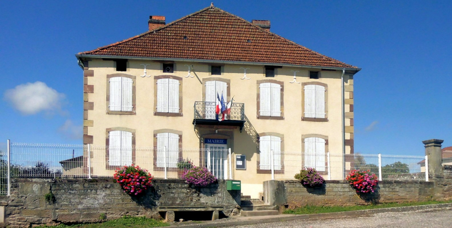 La mairie de Selles